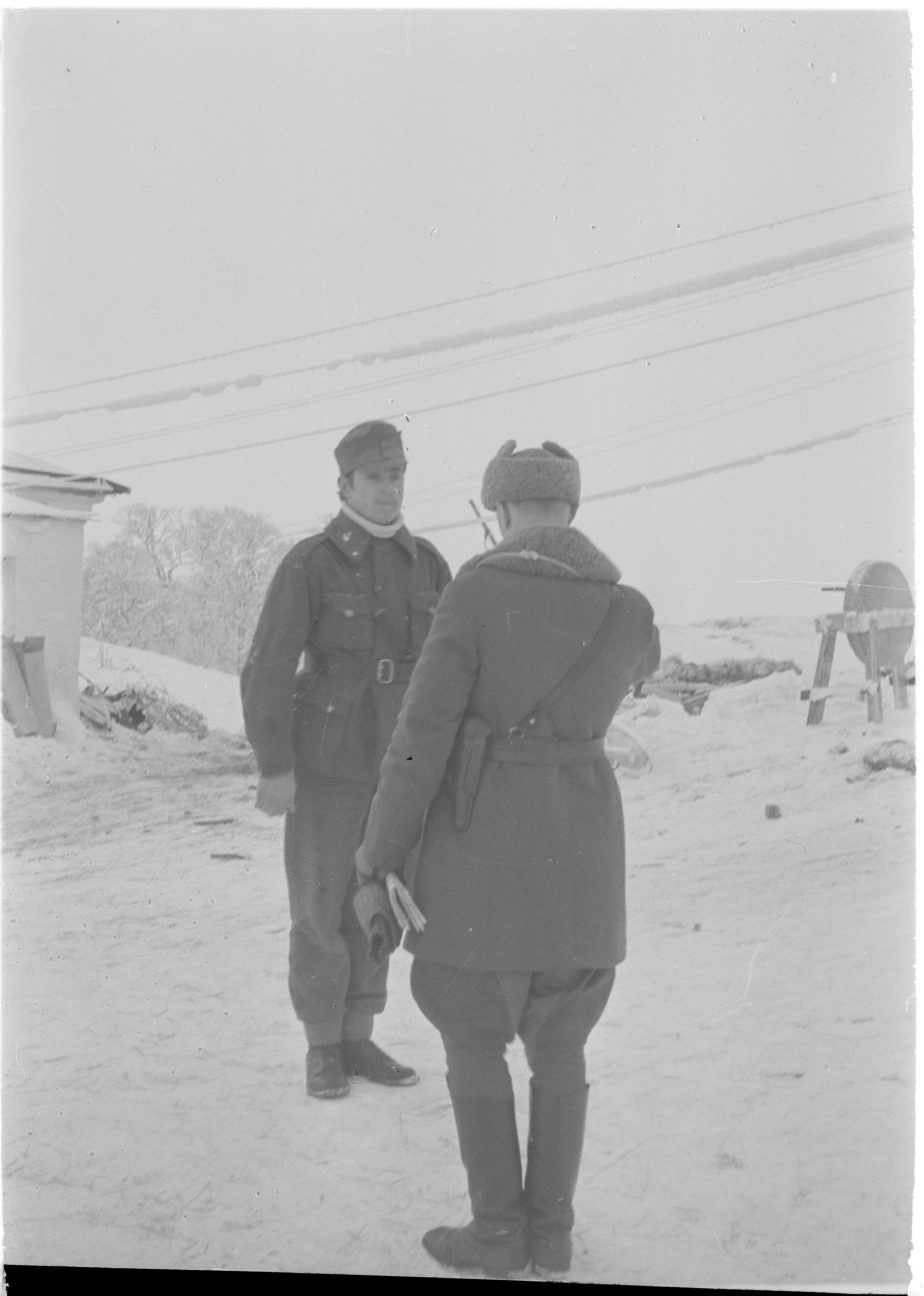 Somerin tukikohdan päällikkö kapteeni Rauhaniemi vastaanottaa päiv.upseerin ilmoituksen.